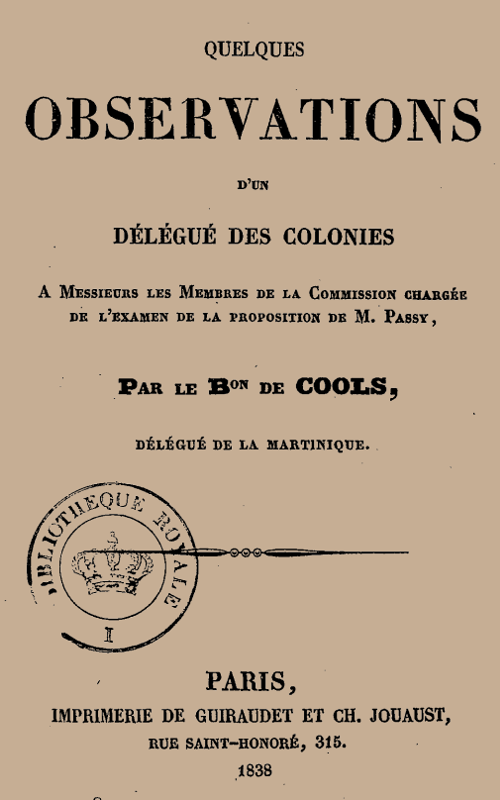 Amédée de Cools des Noyers.- Quelques Observations d'un délégué des colonies à MM. les membres de la Commission chargée de l'examen de la proposition de M. Passy, page de titre, 1838.